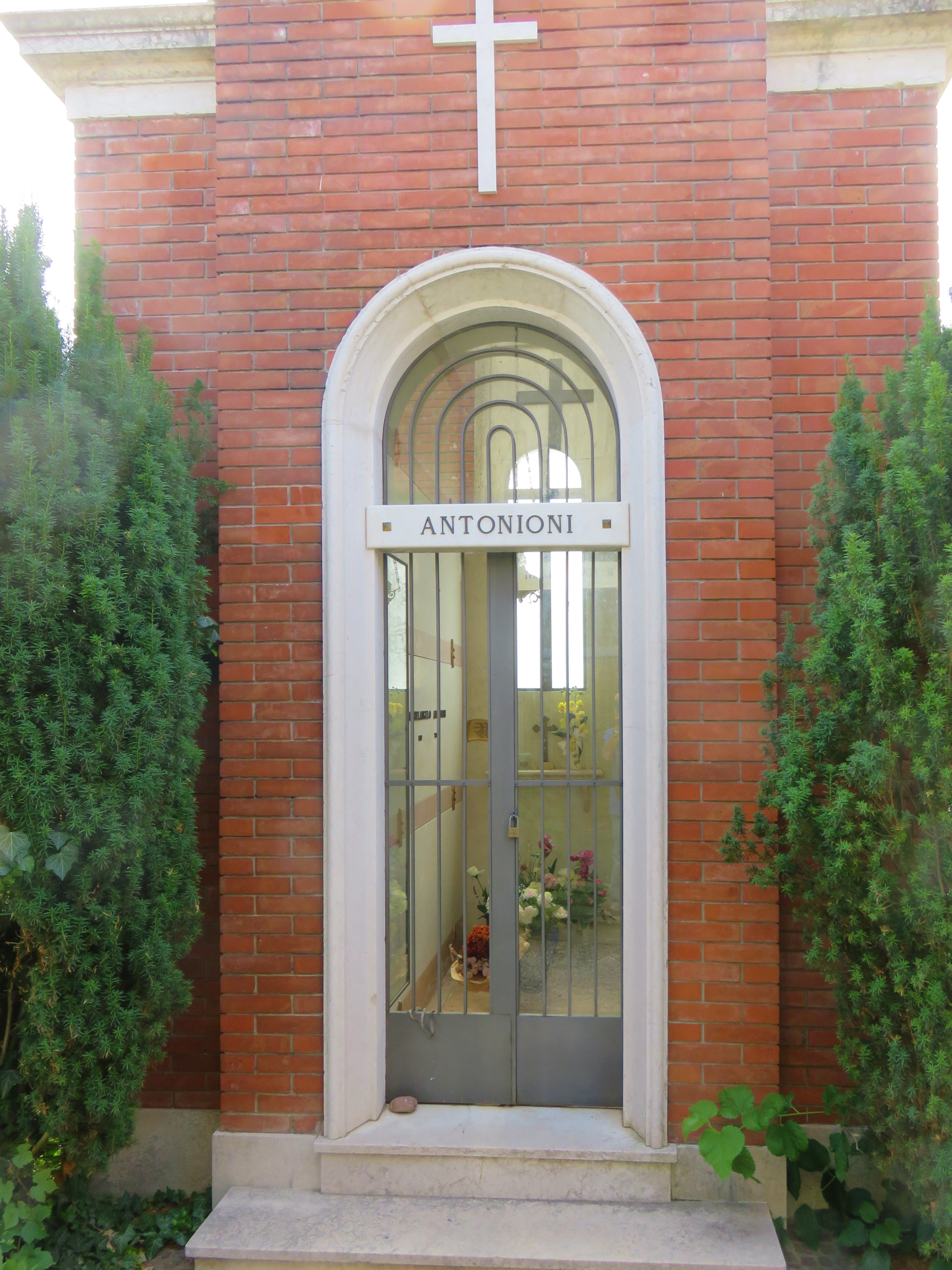 La tomba di Michelangelo Antonioni nella Certosa di Ferrara